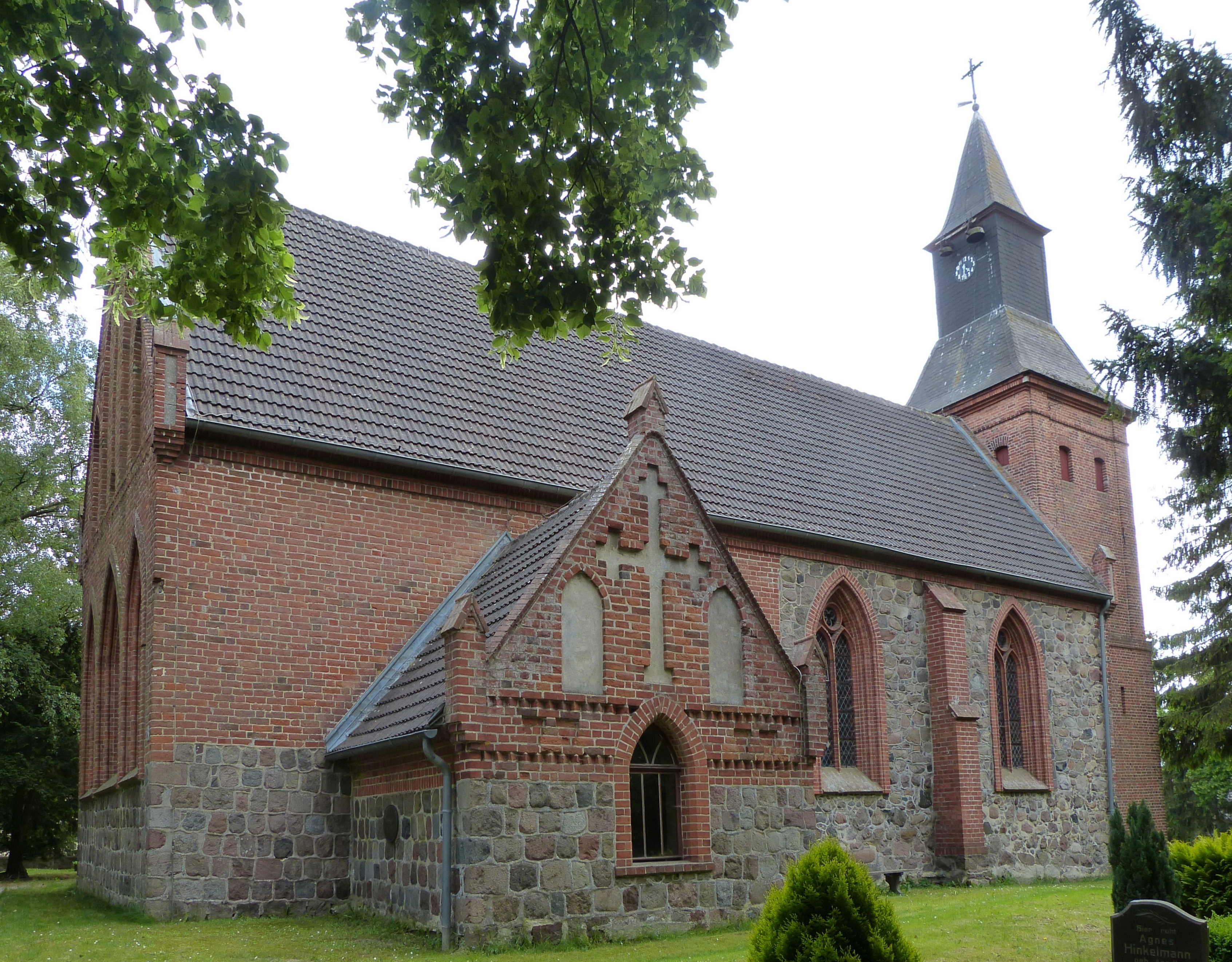 Sankt-Nikolai-Kirche in Wotenick bei Demmin, Nordseite mit Sakristei